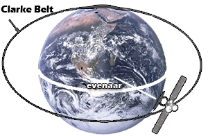 Clarke Belt, de geostationaire baan om de aarde